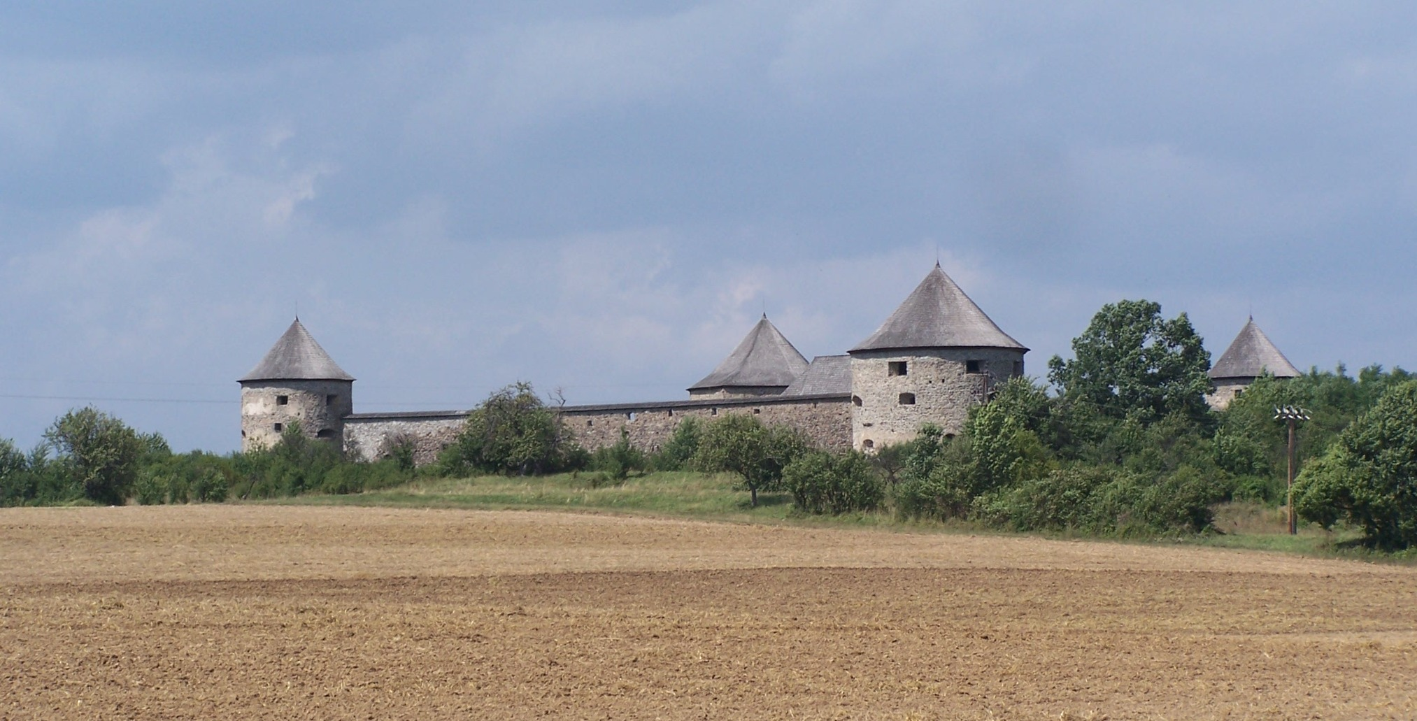 Bzovík Castle, Slovakia, Krupina District